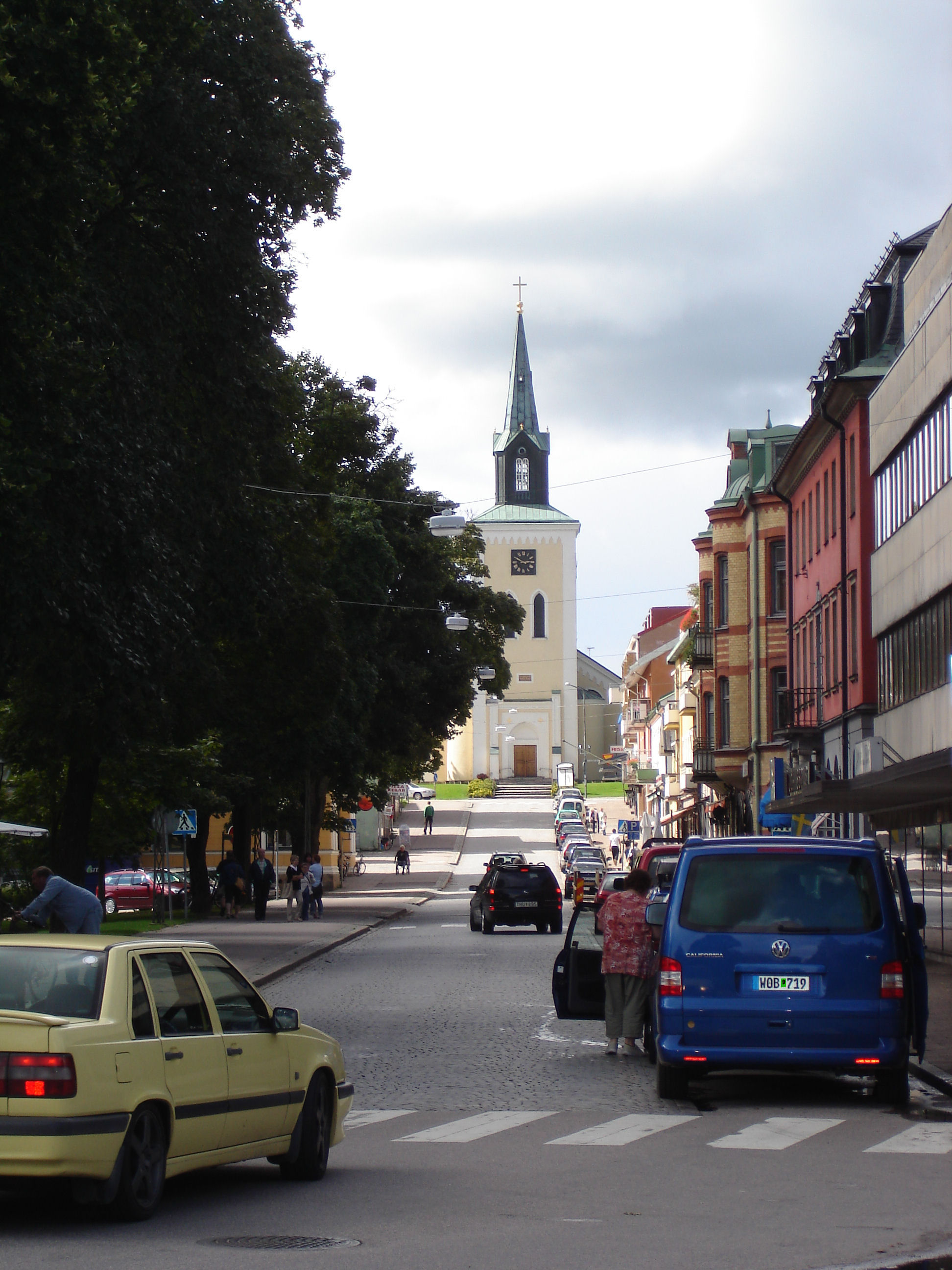 Blick auf die Storgatan in Ljungby - Am Ende ist die Kirche zu sehen.